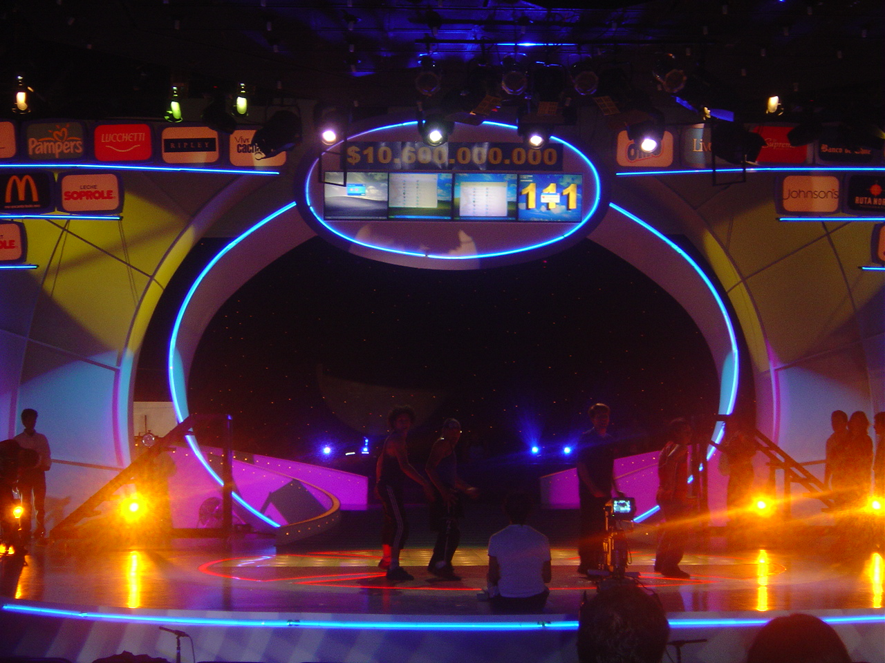 Escenografia del Evento Teleton Chile 2004, en el Teatro Teleton de Santiago de Chile